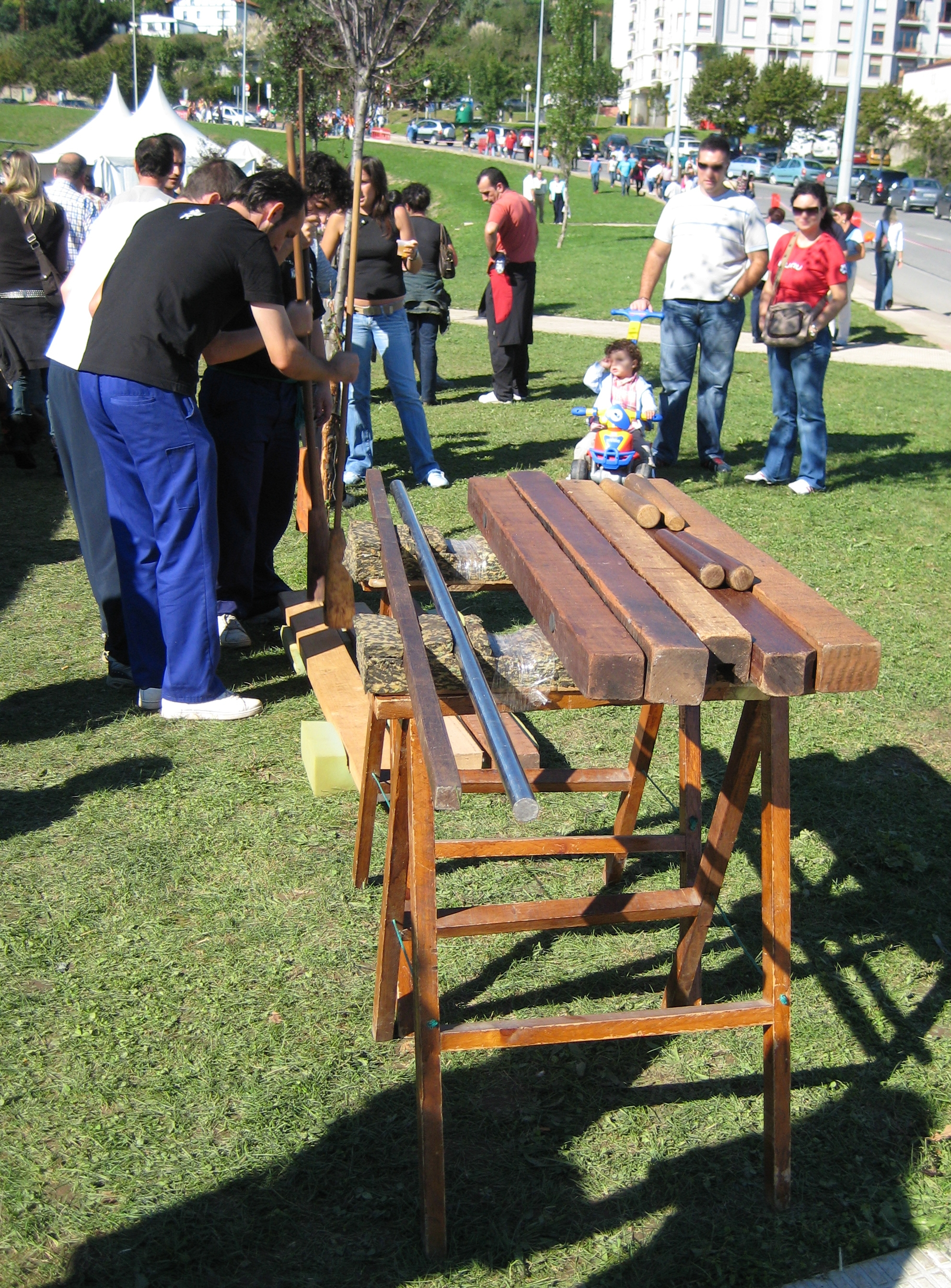 Txalaparta de cinco maderos